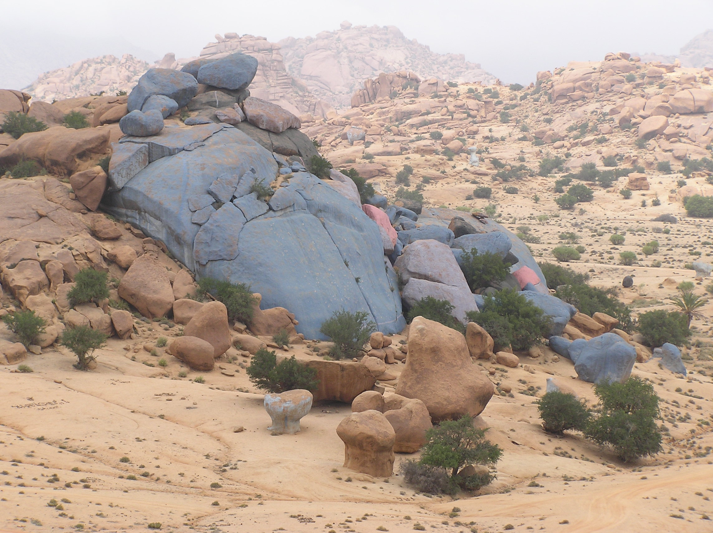 les rochers bleus, oeuvre du peintre belge Jean Vérame. situés prés de Tafraout.